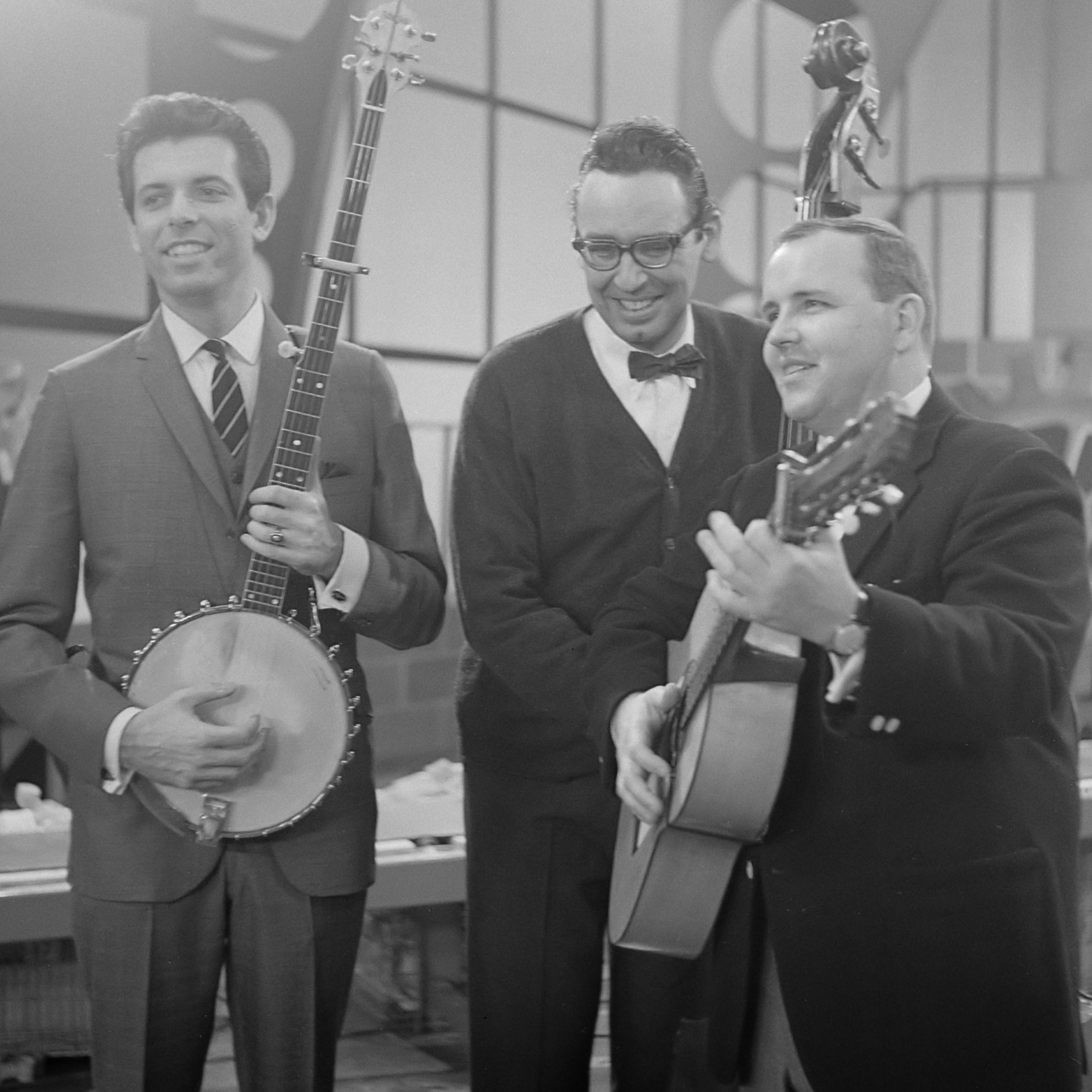 Rudy Carrellshow voor Vara-TV, The Lime Lighters Amerikaans trio 8 februari 1963